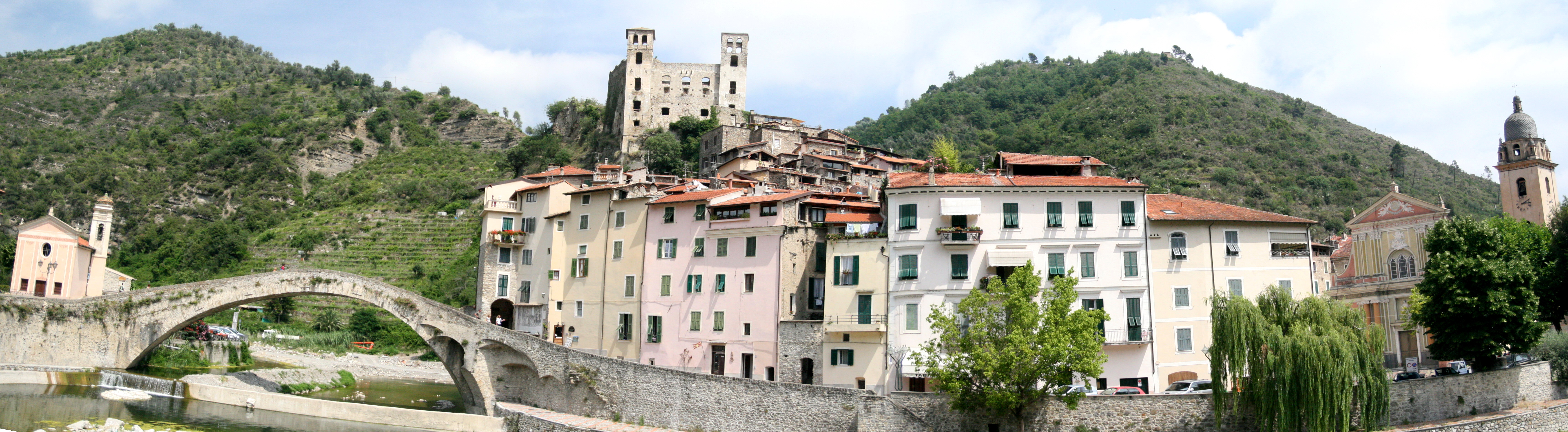 Dolce Aqua, Ligurien